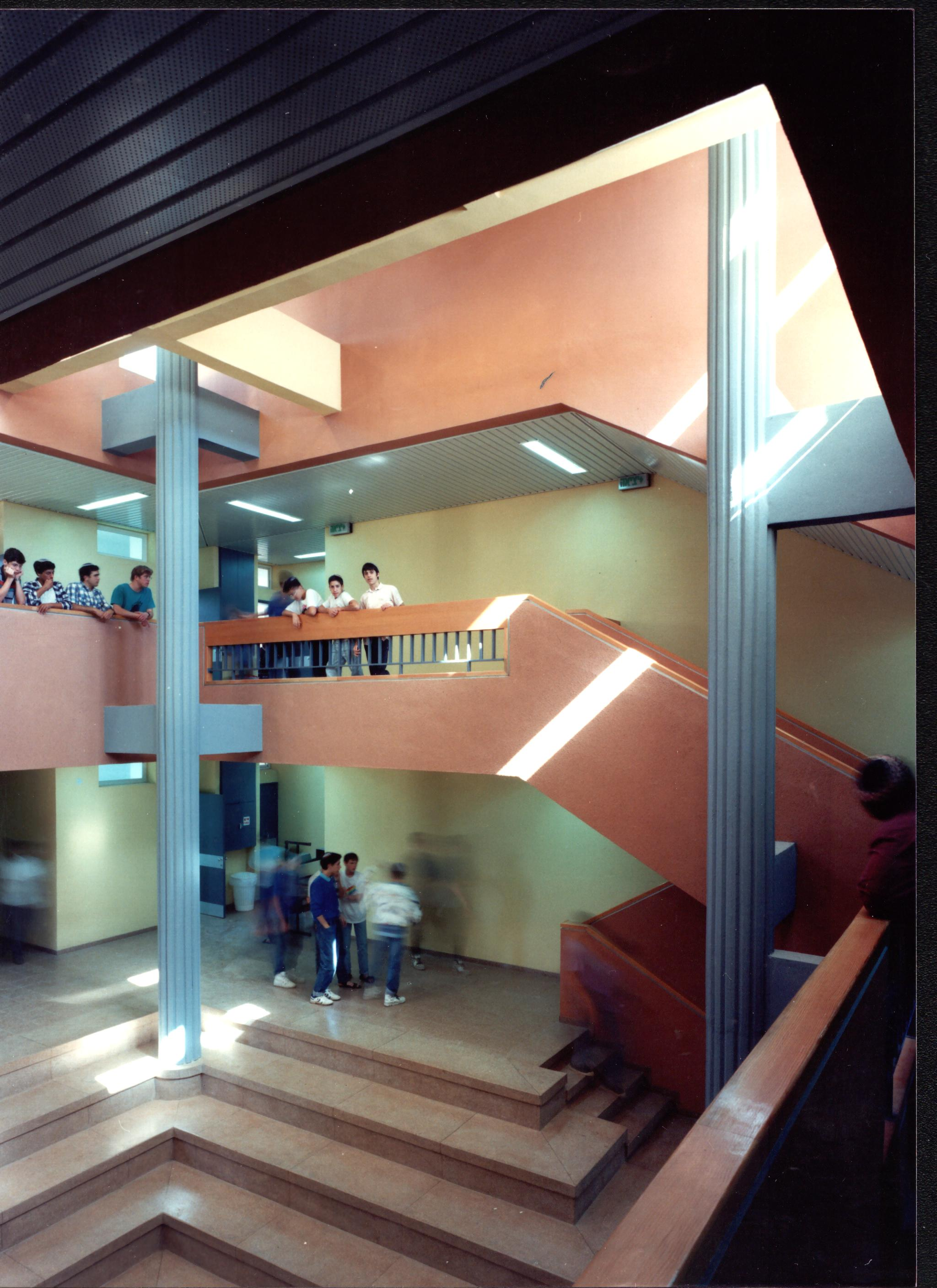 ישיבת השומרון אדירכלית רחל ולדן 1990